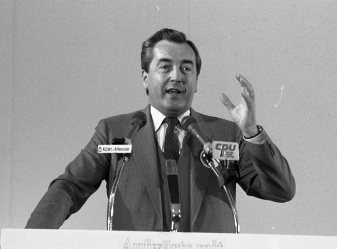 25.5.1983 31. Bundesparteitag der CDU in der Congress-Halle 8 der Kölner Messe.